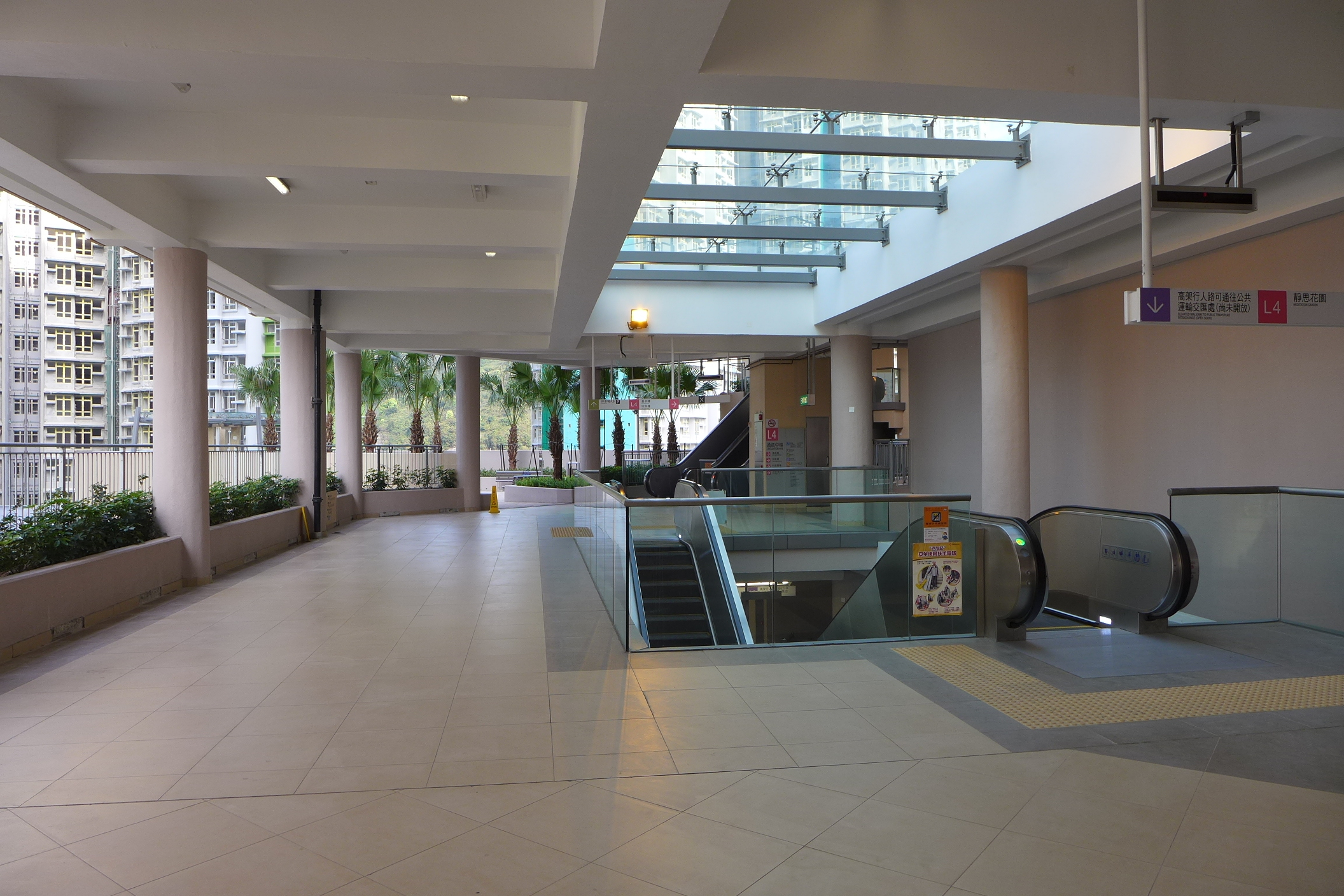 Shui Chuen O Estate Circulation Hub